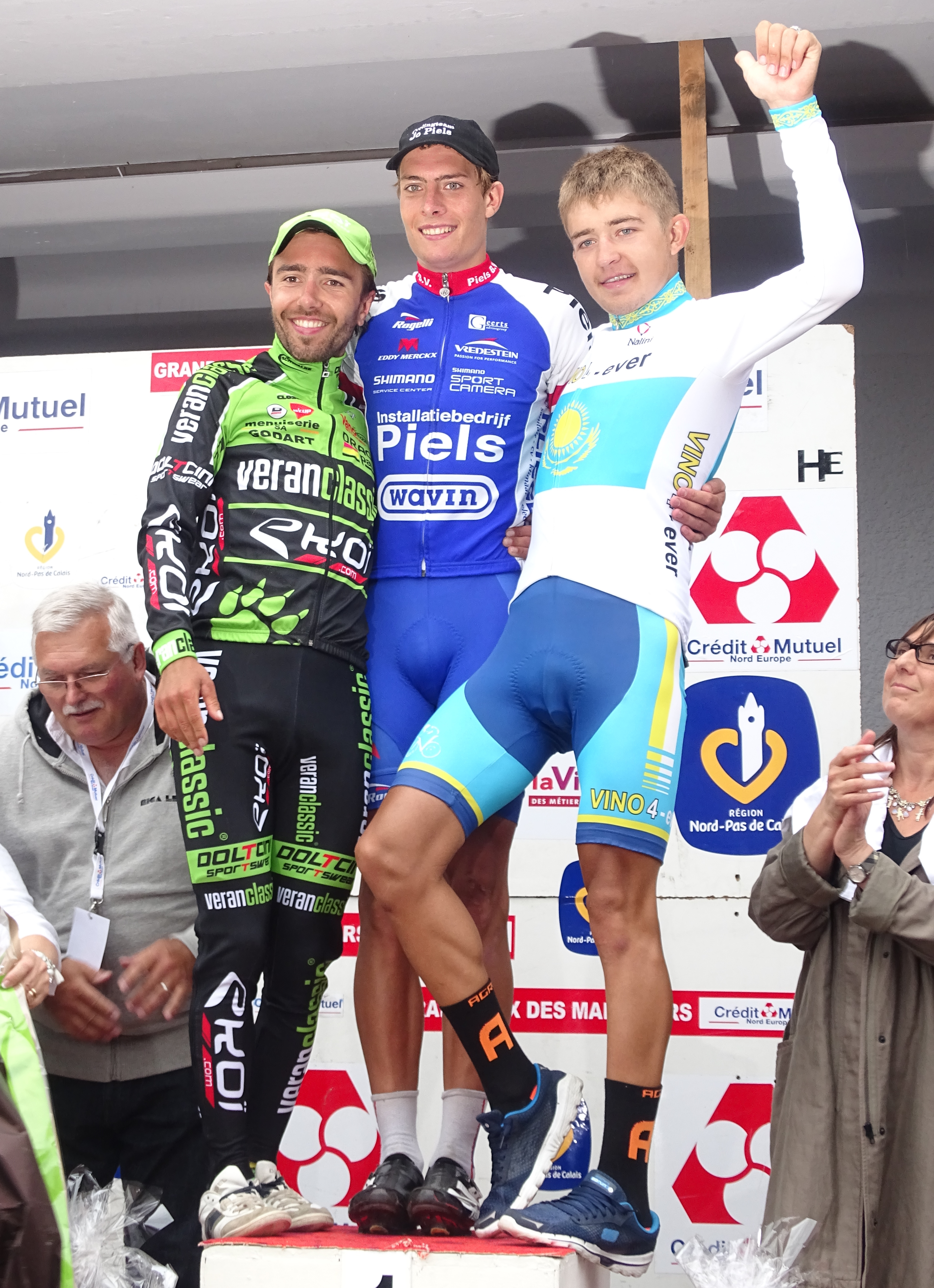 Reportage réalisé le mardi 25 août à l'occasion du départ et de l'arrivée du Grand Prix des Marbriers 2015 à Bellignies, Nord-Pas-de-Calais, France.